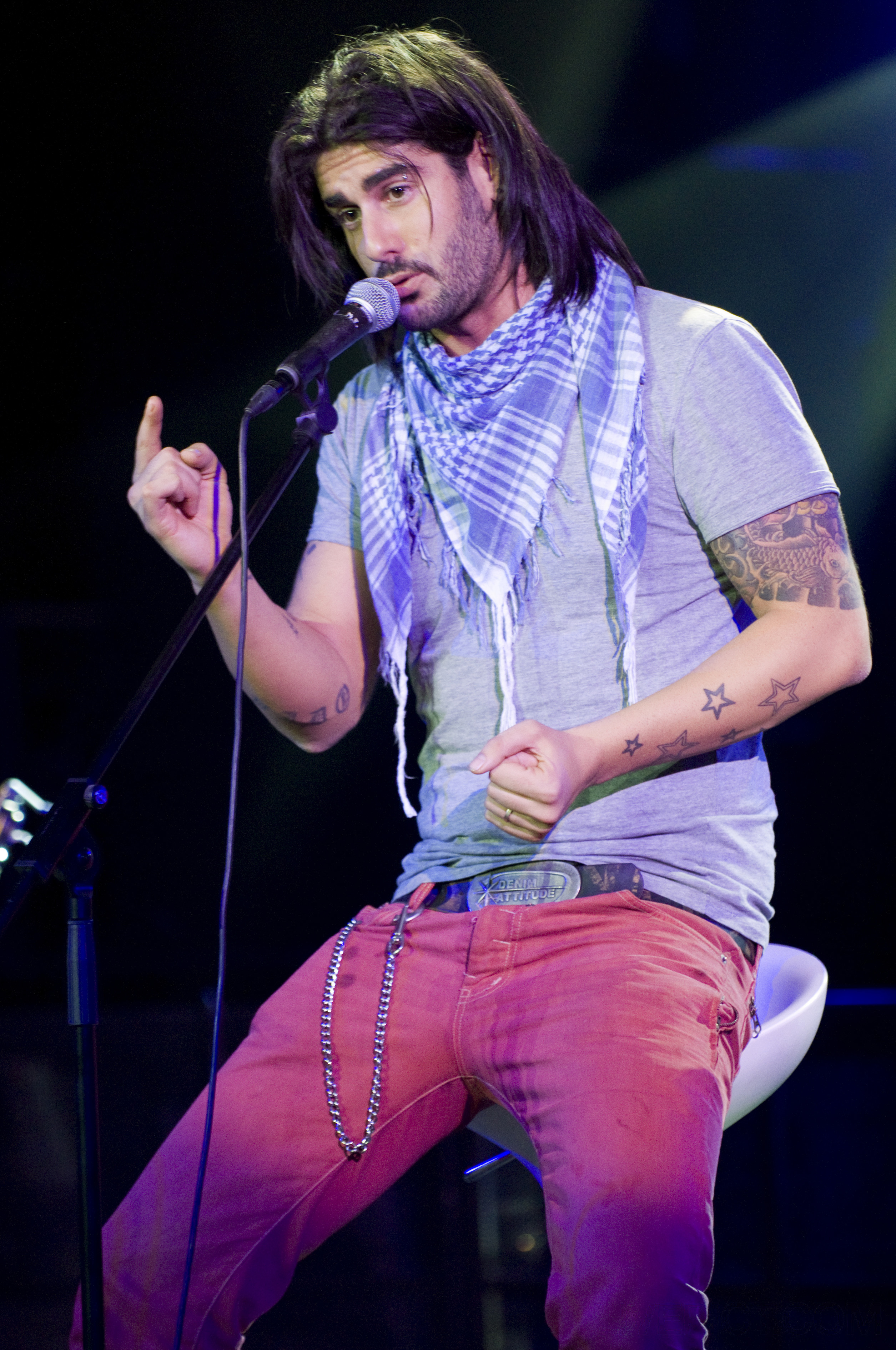 Melendi